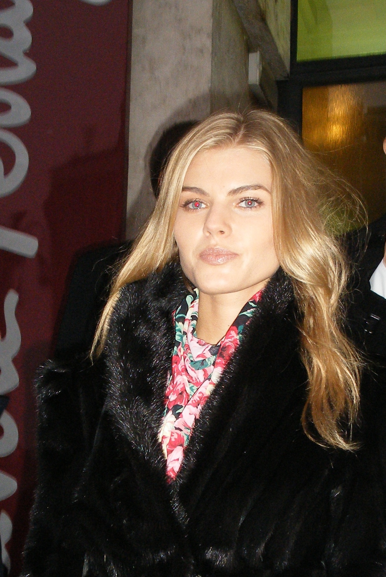 Maryna Linchuk dopo la sfilata per Salvatore Ferragamo (Milano, febbraio 2010)